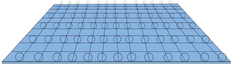 Des dimensions enroulées en cercles, dans le contexte de la théorie de Kaluza-Klein